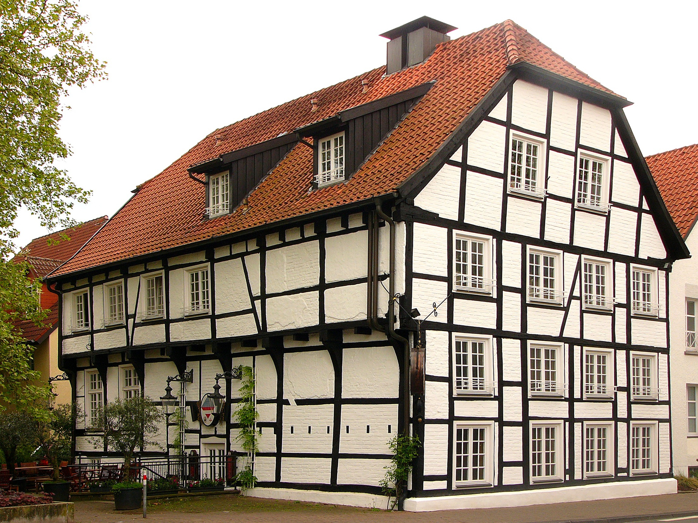 Fachwerkhaus HeninThis is a photograph of an architectural monument., no. 49